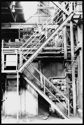 Detail Vulcanus Vaassen, The Netherlands, photo: J Robert Germeraad